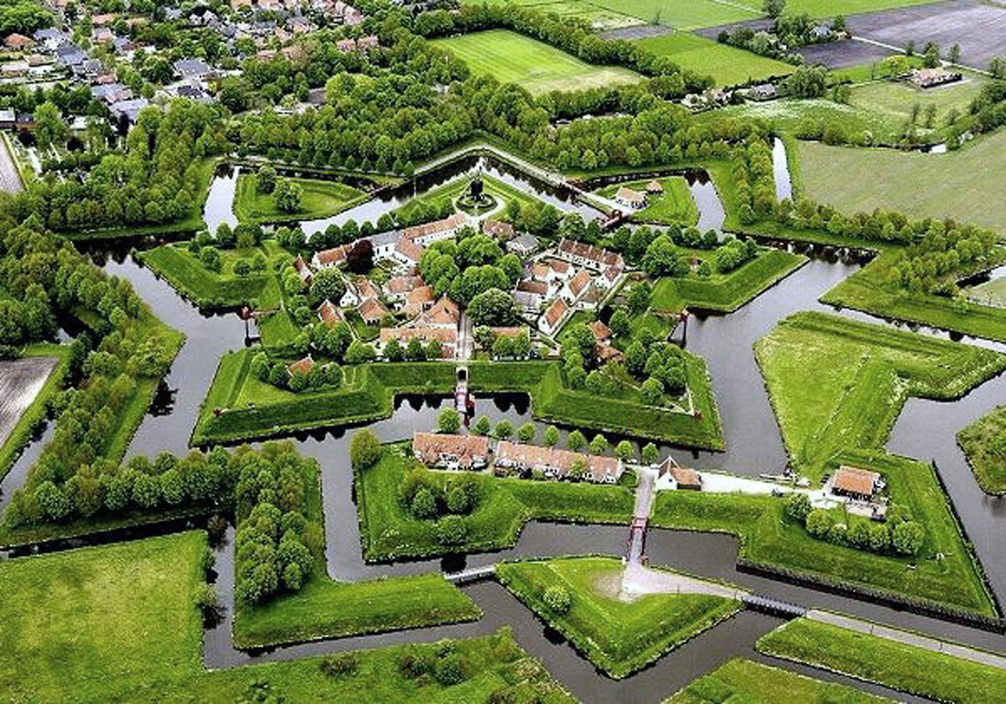 Vestingstadje Bourtange